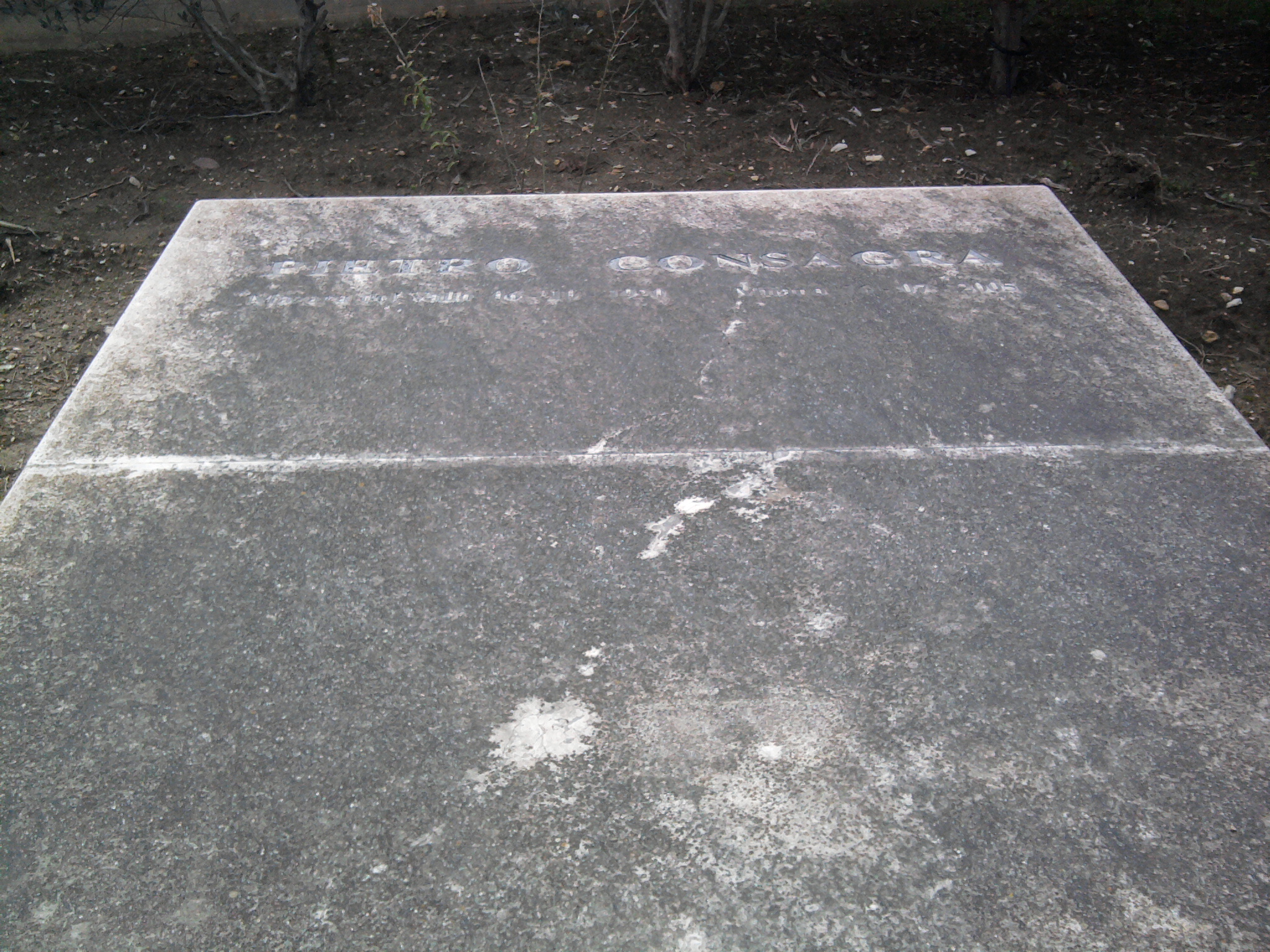 Tomba monumentale di Pietro Consagra a Gibellina